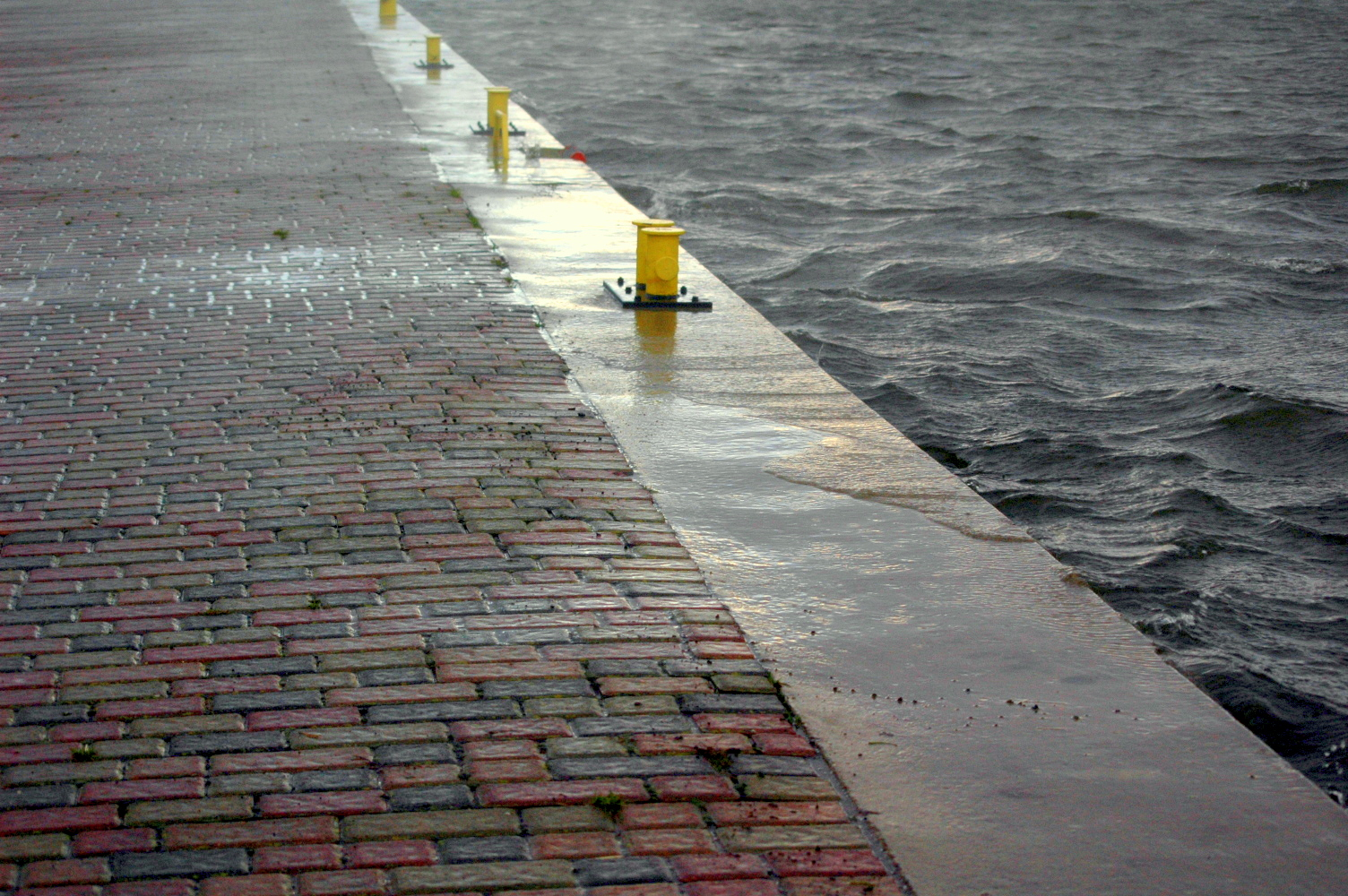 Efekt cofki na wolińskim nabrzeżu.